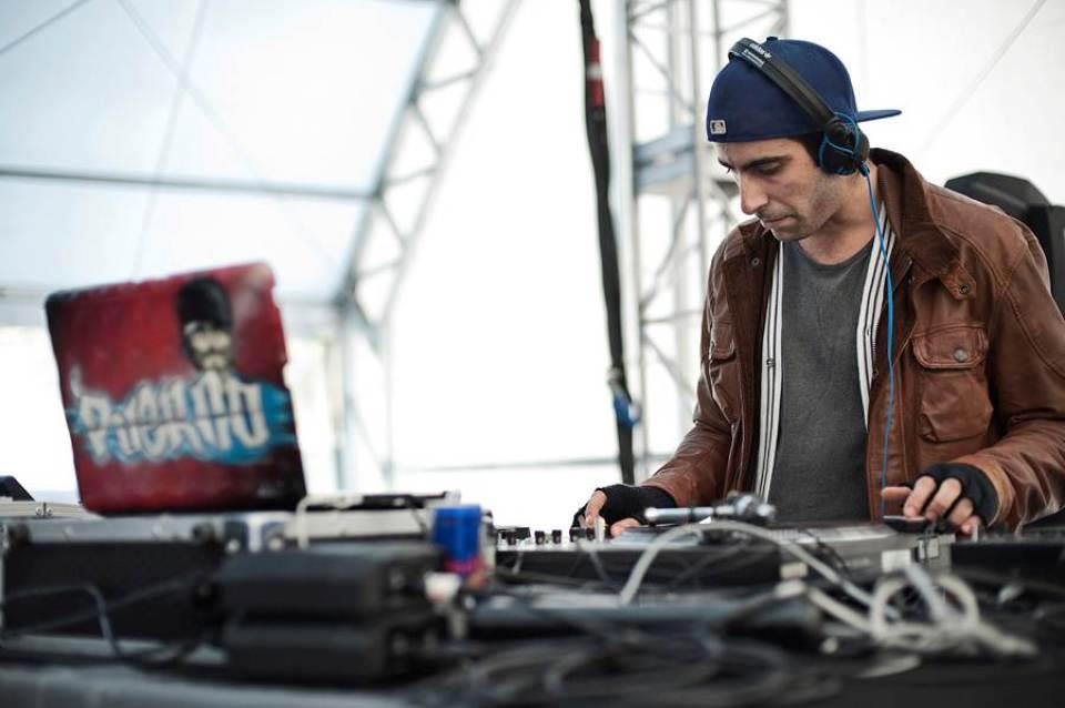 Red Bull Soundclash soundcheck